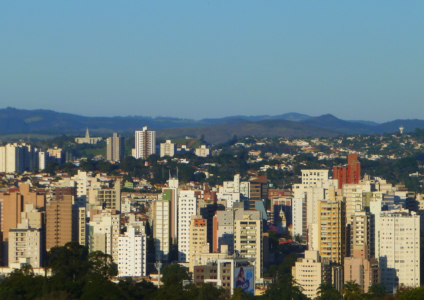 Campinas, SP